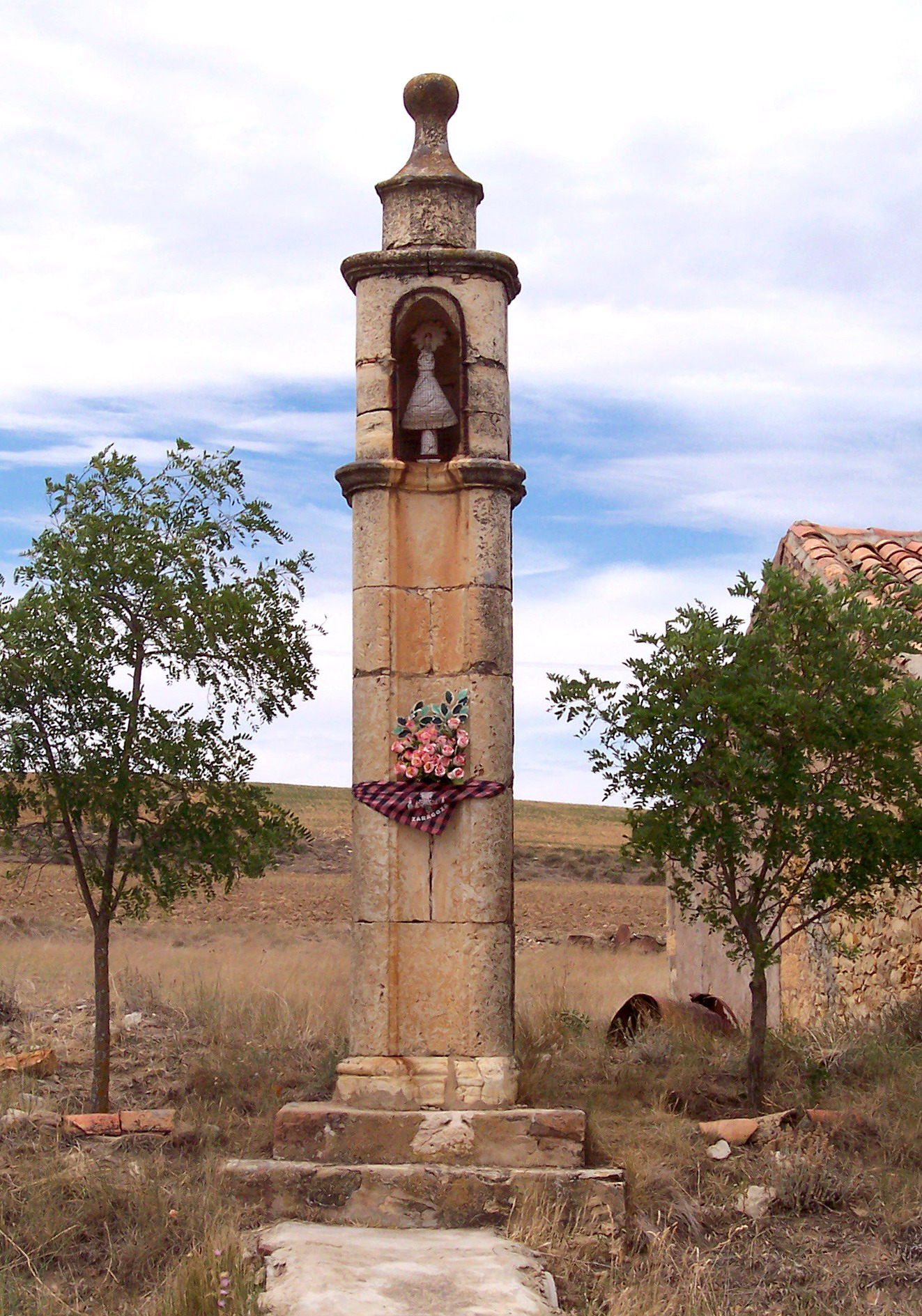 Pairón dedicado a la Vírgen del Pilar, en la cuneta de la carretera a Calatayud, Cillas, Guadalajara, España